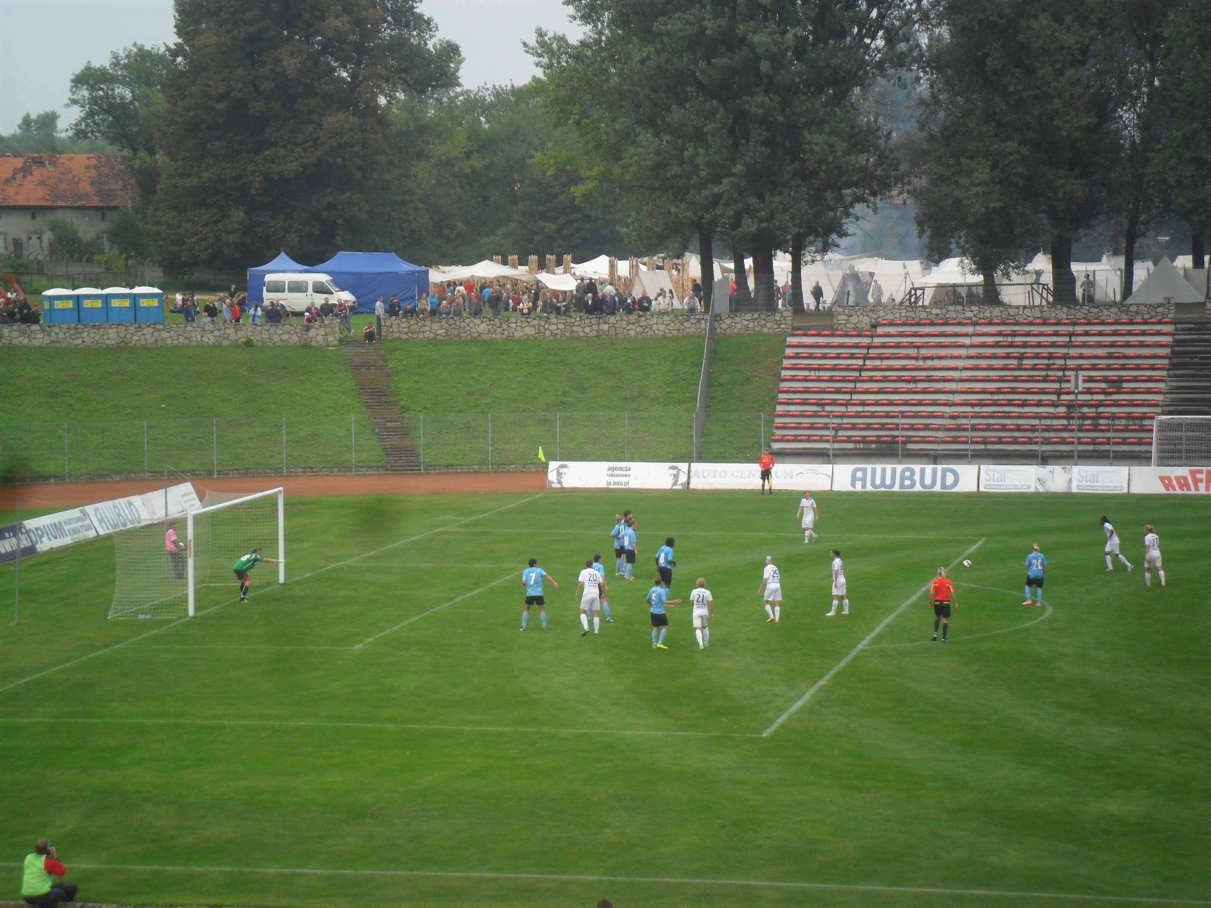 Mecz Ekstraligi kobiet 1 września 2012 roku RTP Unia Racibórz - Medyk Konin (3:0)